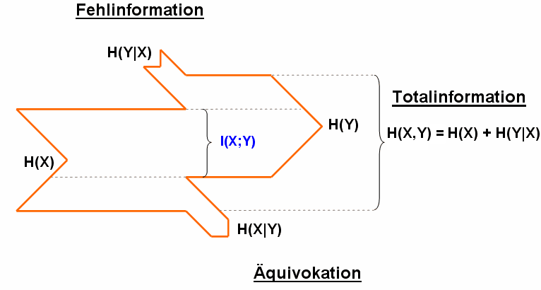 Informationstheorie - Entropie; Zwei Quellen. X Sendequelle und Y Empfängerquelle information theorie - entropy